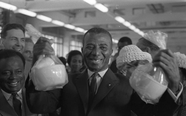 Staatspräsident von Togo, Olympio, zu Besuch in den Farbwerken Hoechst am Main